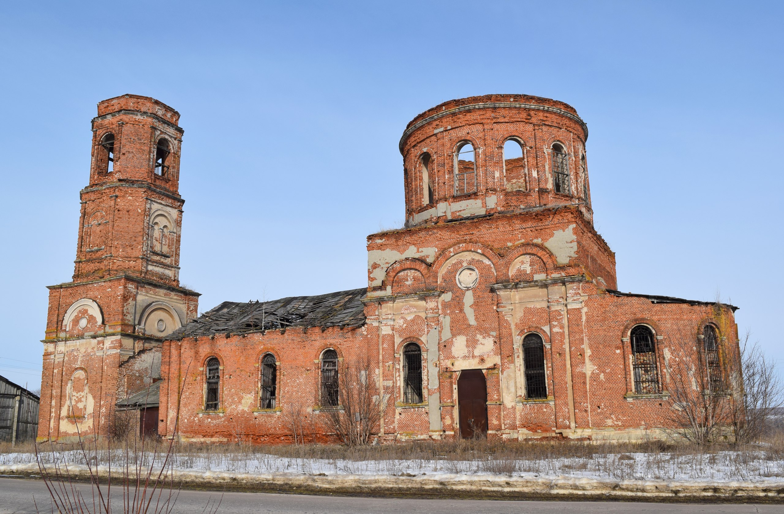 Архангельская церковь села Павелец, Скопинский район, Рязанская область